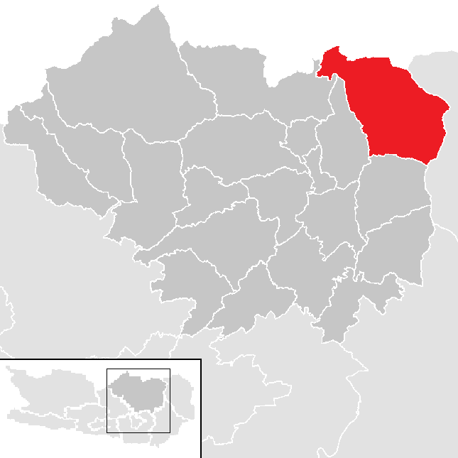 Bezirk Sankt Veit an der Glan